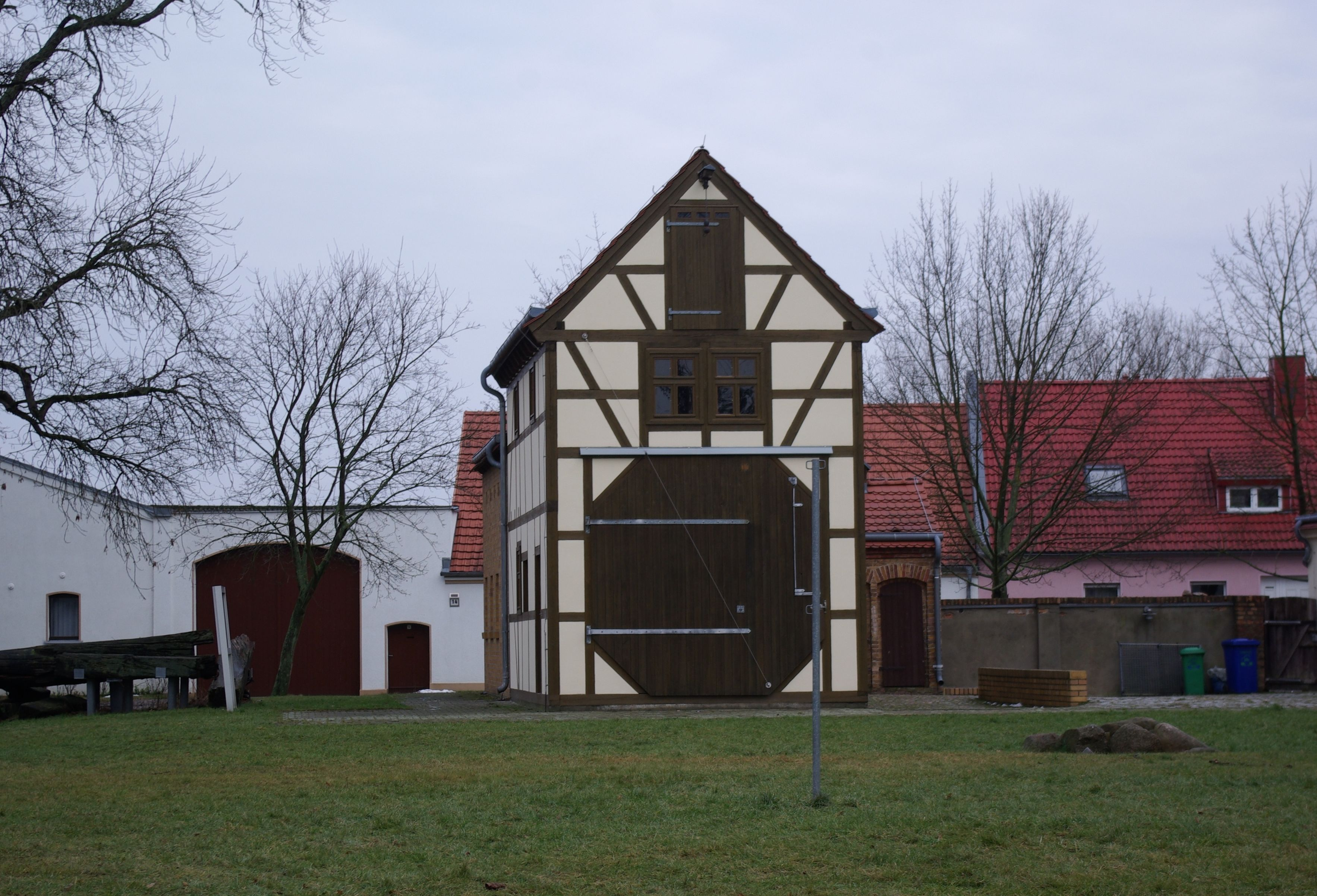 Am Mellensee, Ortsteil Saalow in Brandenburg. Die Scheunenwindmühle steht in Ortsteil Saalow der Gemeinde Am Mellensee. Das Tor der Mühle ist geschlossen (geotags in de exif-daten).